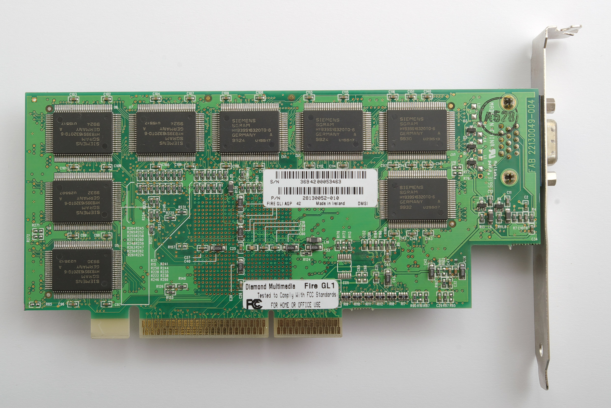 Diamond FireGL1 AGP Rückseite